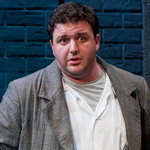 Максим Виторган в спектакле «Ближе» 20 марта 2010 года